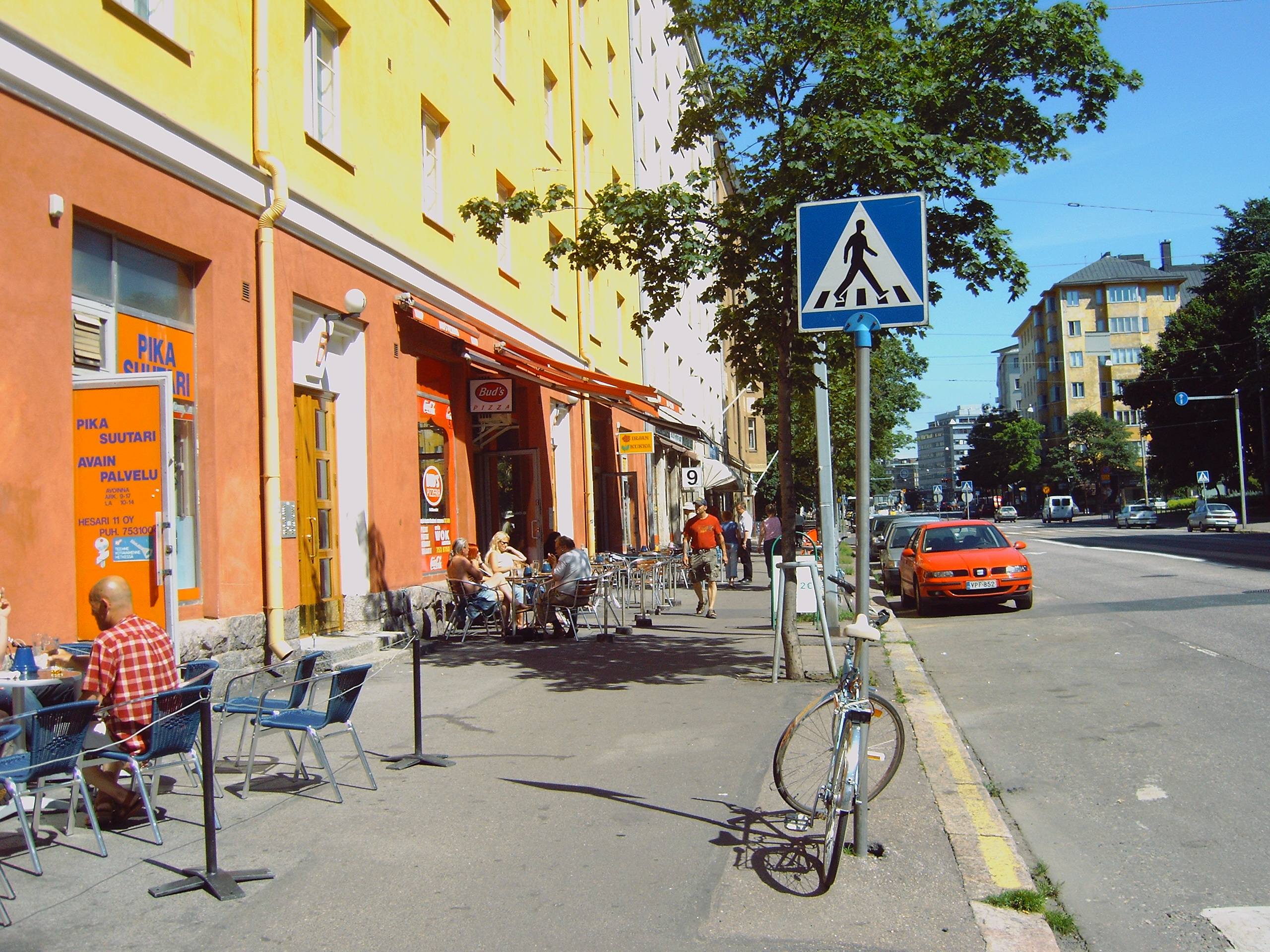 Helsinginkatu in Kallio, Helsinki, Finland